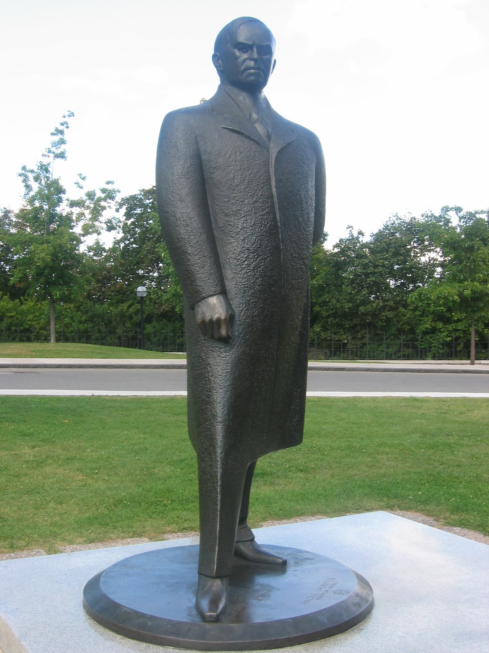 Statue de William Lyon Mackenzie King, Parlement du Canada, Ottawa